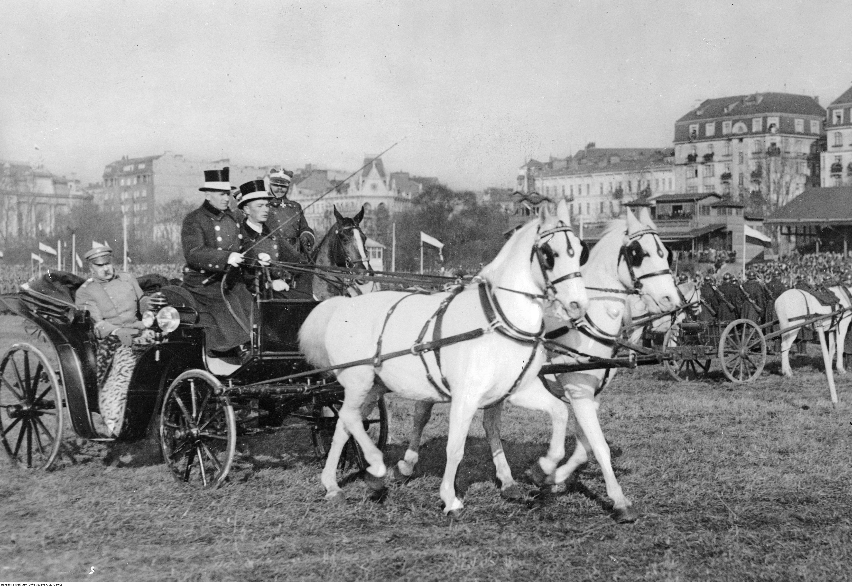 Marszałek Józef Piłsudski przybywa powozem konnym na uroczystości na Polu Mokotowskim. Widoczny także m.in. wiceminister spraw wojskowych gen. Daniel Konarzewski (jedzie obok, na koniu).